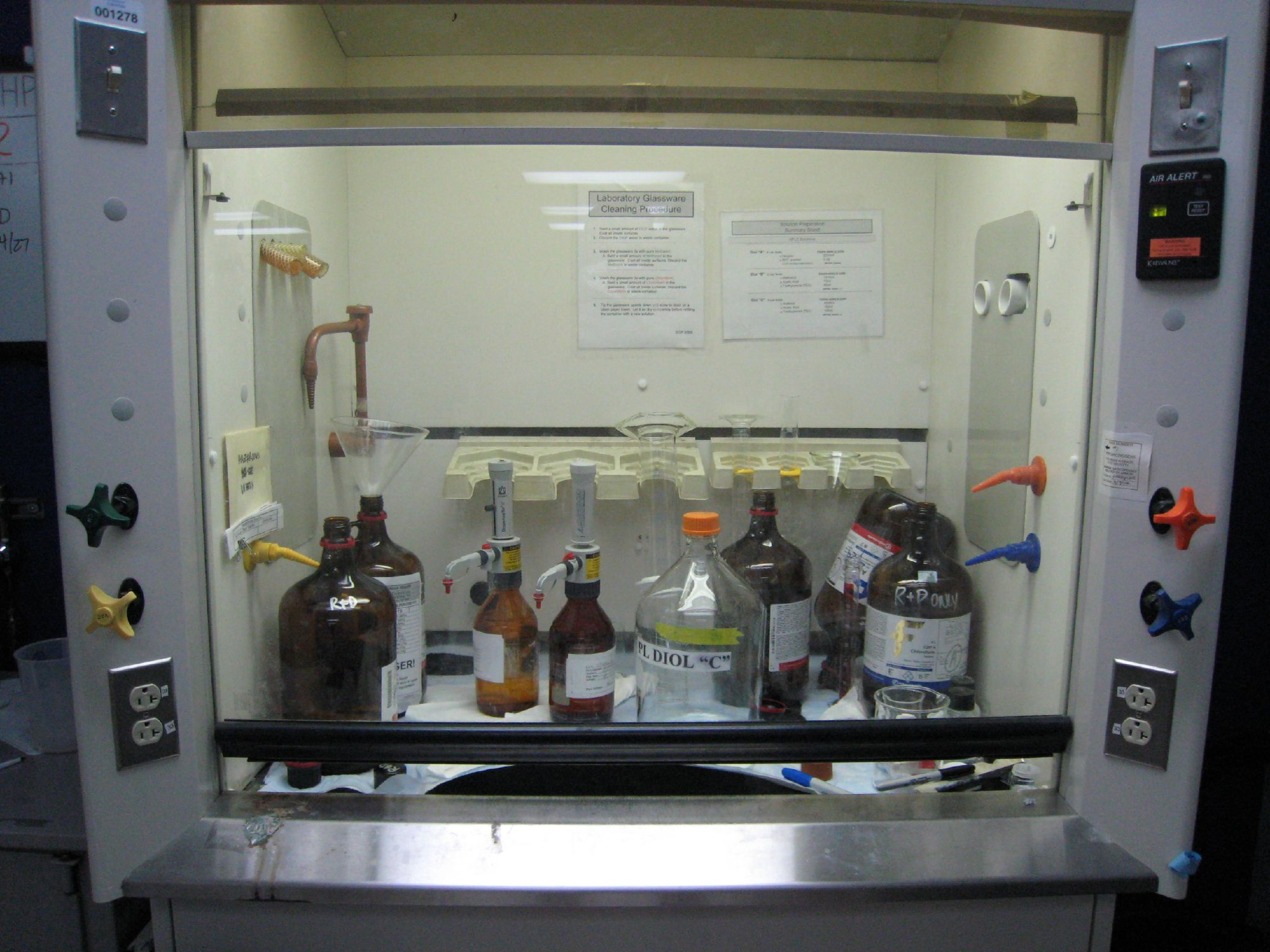 Fume hood